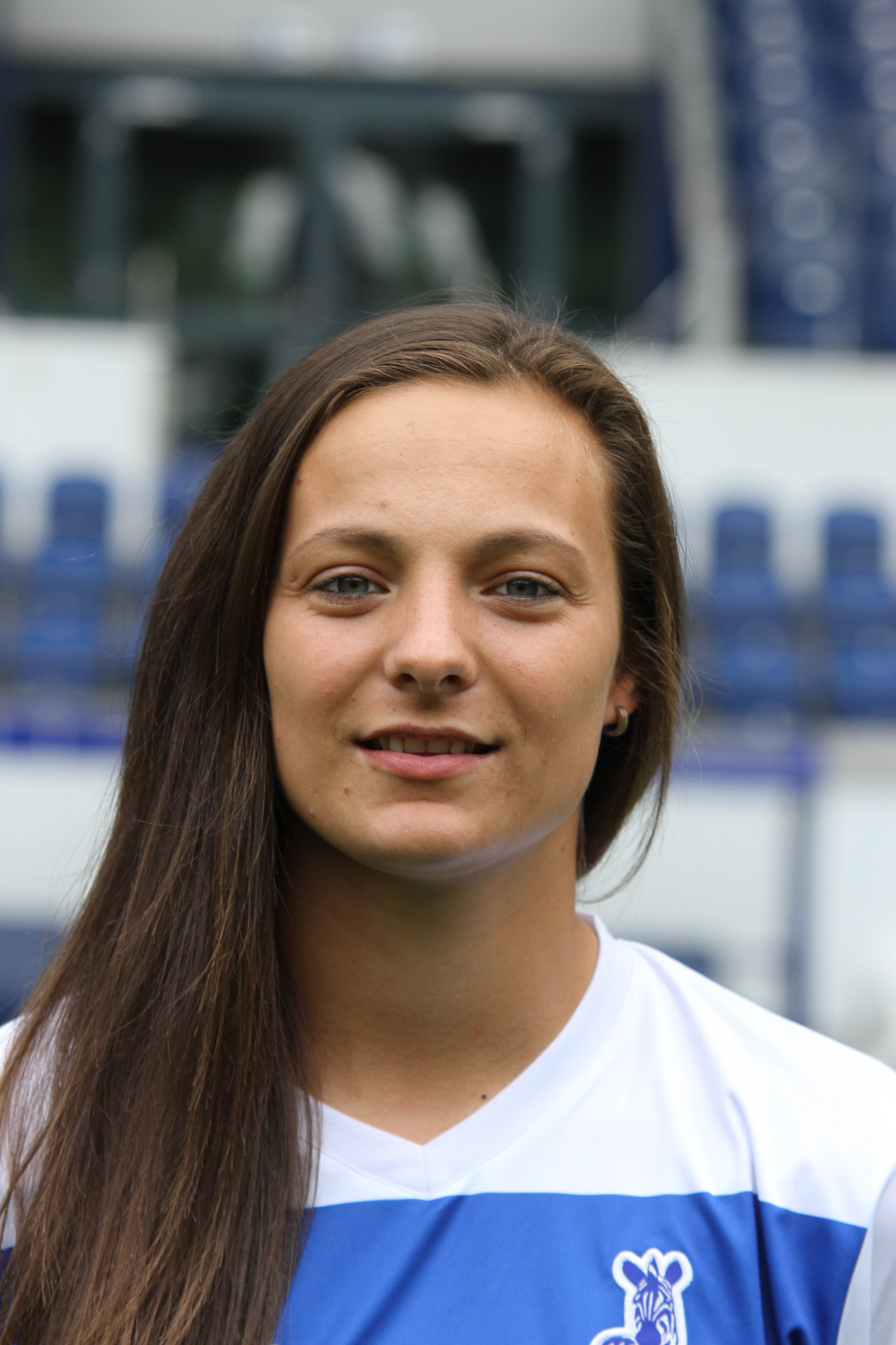 Lucie Voňková (2014)